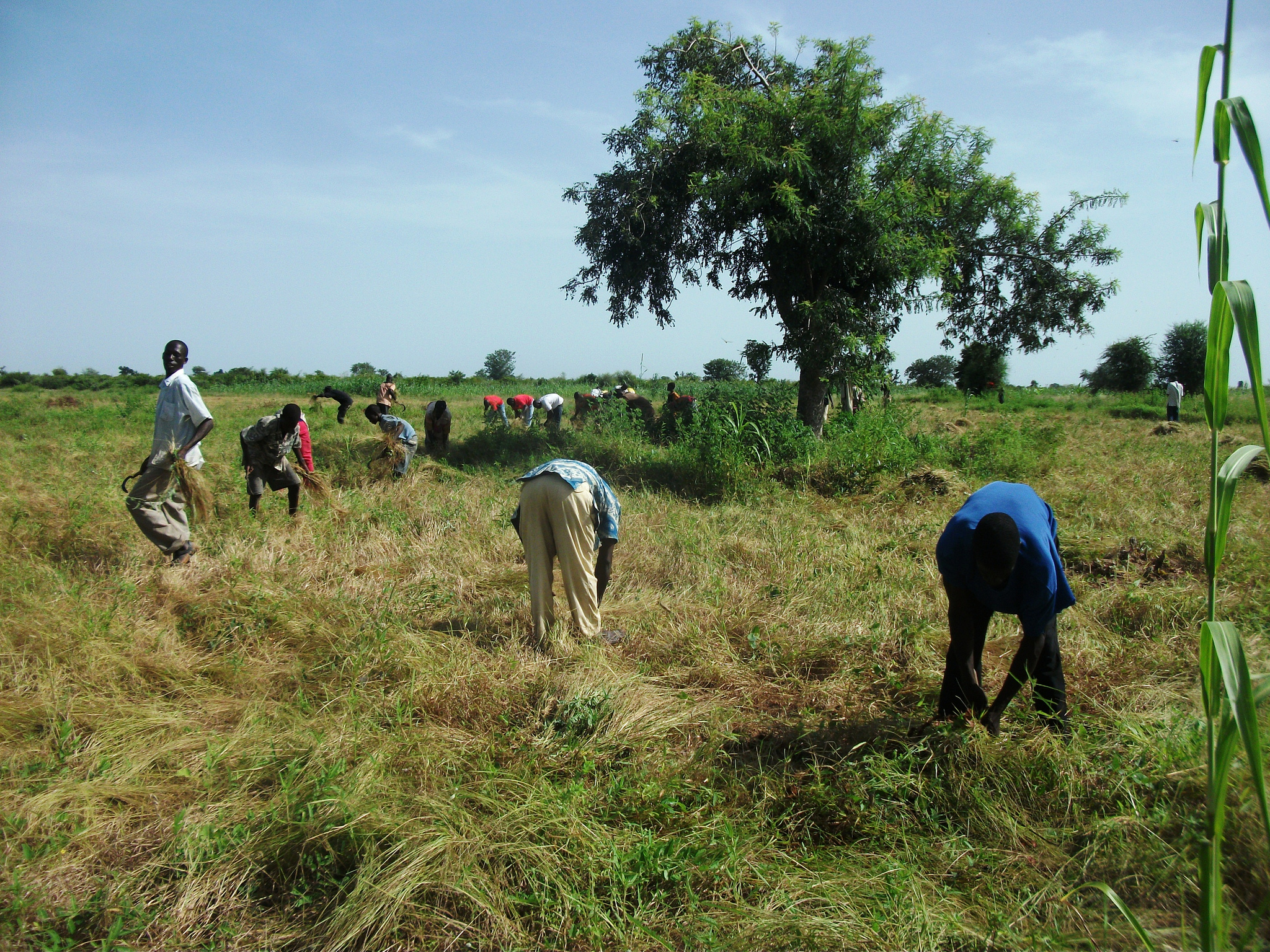 Jeunes du village aidant une famille pour la moisson du fonio (Mali)